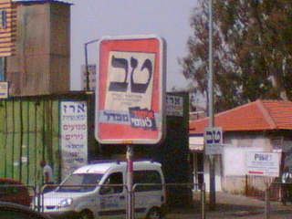 כרזה של האיחוד הלאומי-מפד"ל. ברקע ניתן לראות שלט "טב" שתלו פעילי האיחוד. צילם דוד שי.